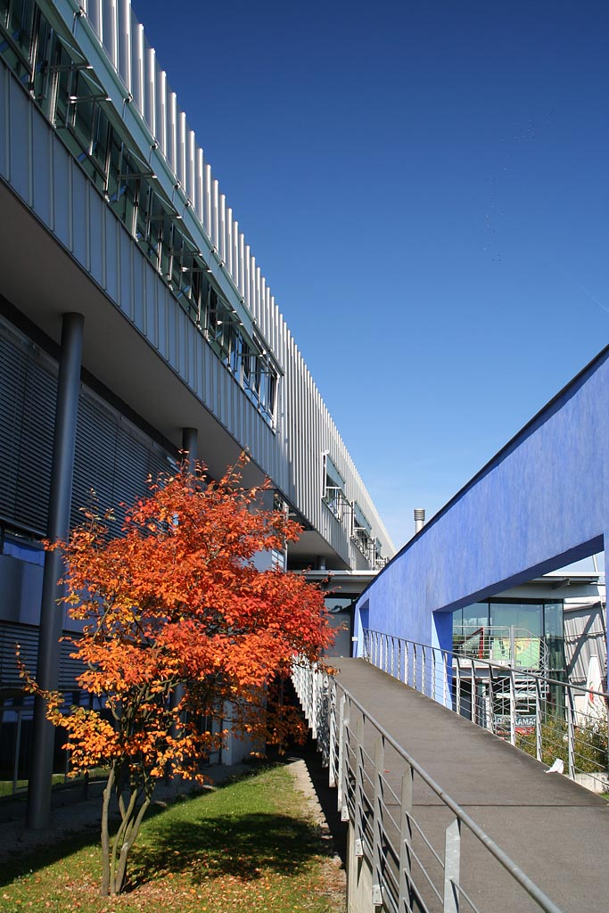 Hochschule der Medien Stuttgart, Neubau